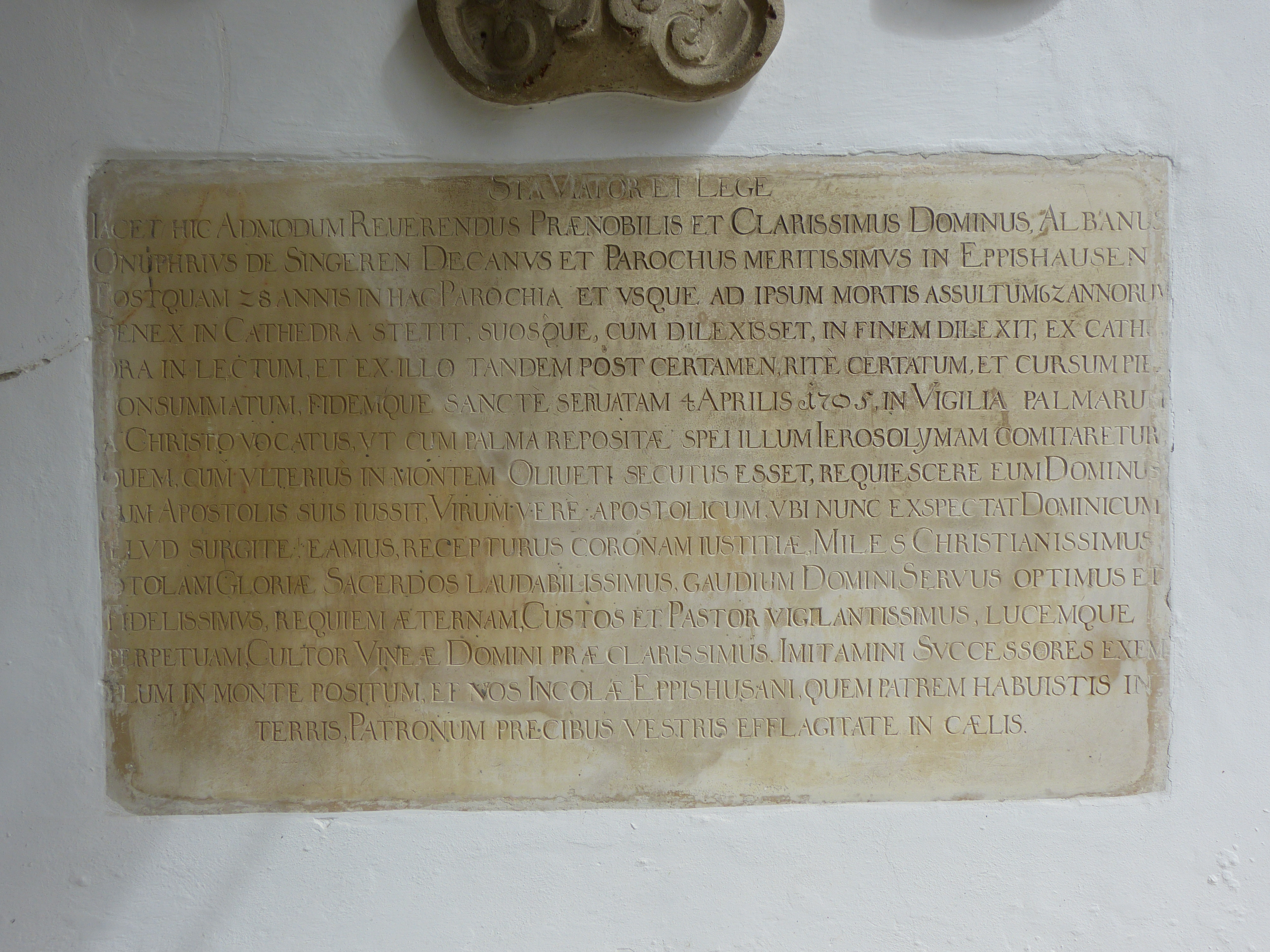 Gedenkplatte für Dekan und Pfarrer Albanus Onuphrius de Singeren († 1705) im Vorzeichen von St. Michael, Eppishausen, Landkreis Unterallgäu, Bayern